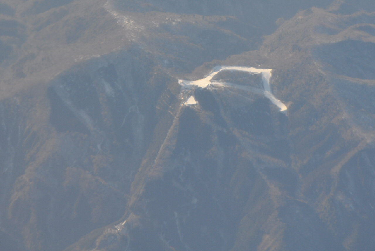 五ヶ瀬ハイランドスキー場。新千歳→那覇便から空撮。